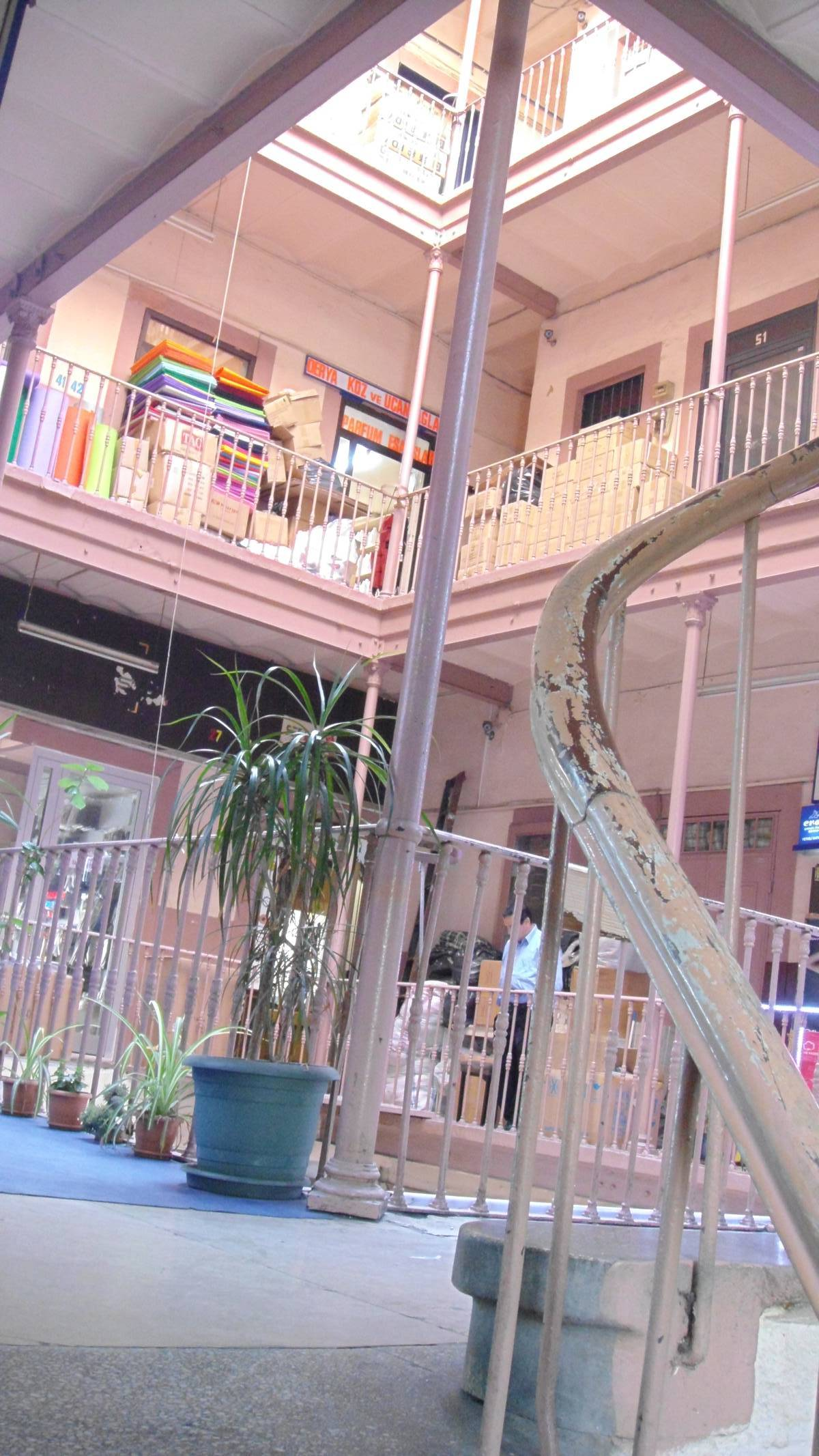 İstanbul ili Fatih ilçesi Mahmutpaşa semtinde bulunan Büyük Abud Efendi Hanı iç resmi